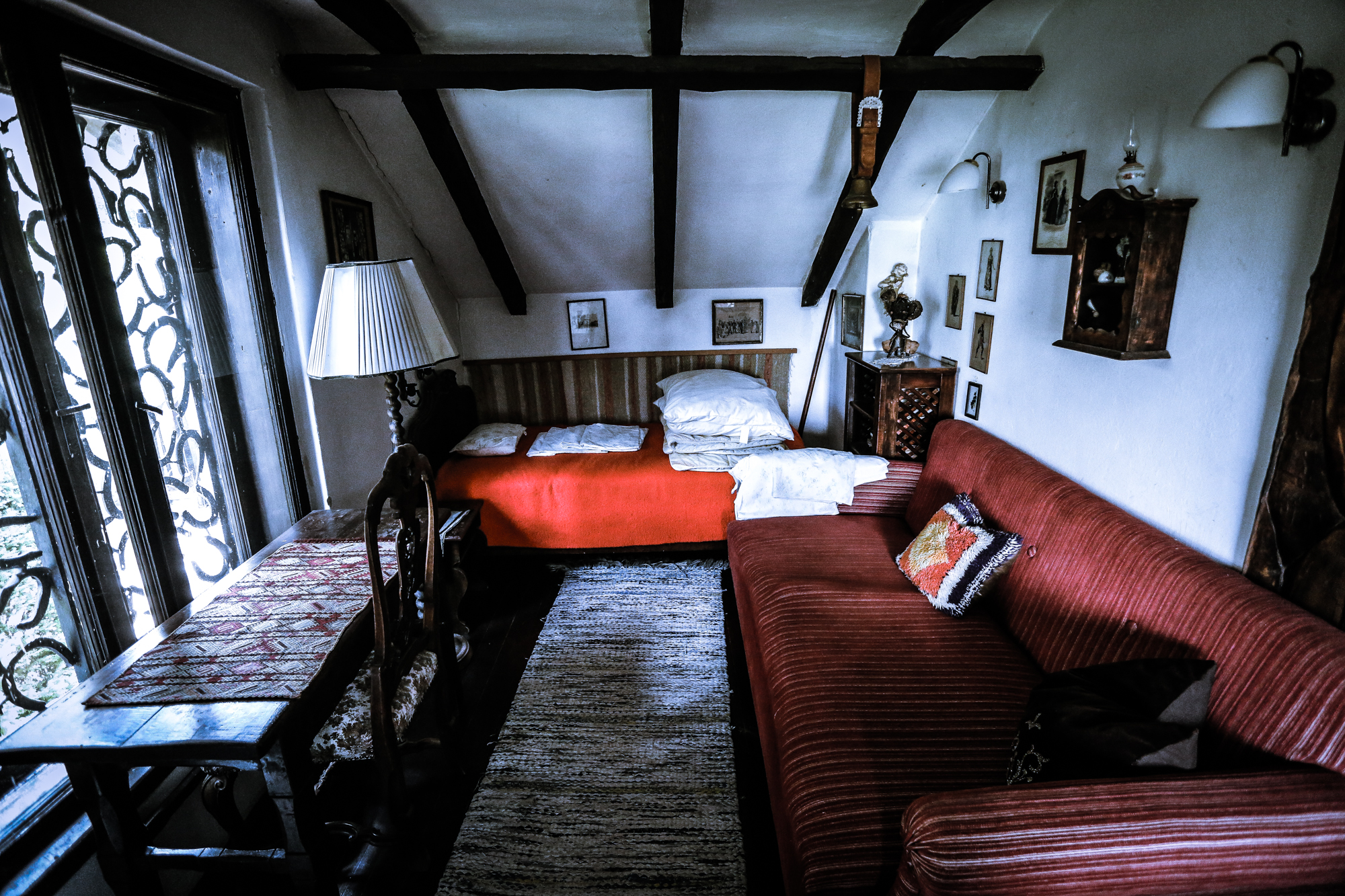 A Patkó villában